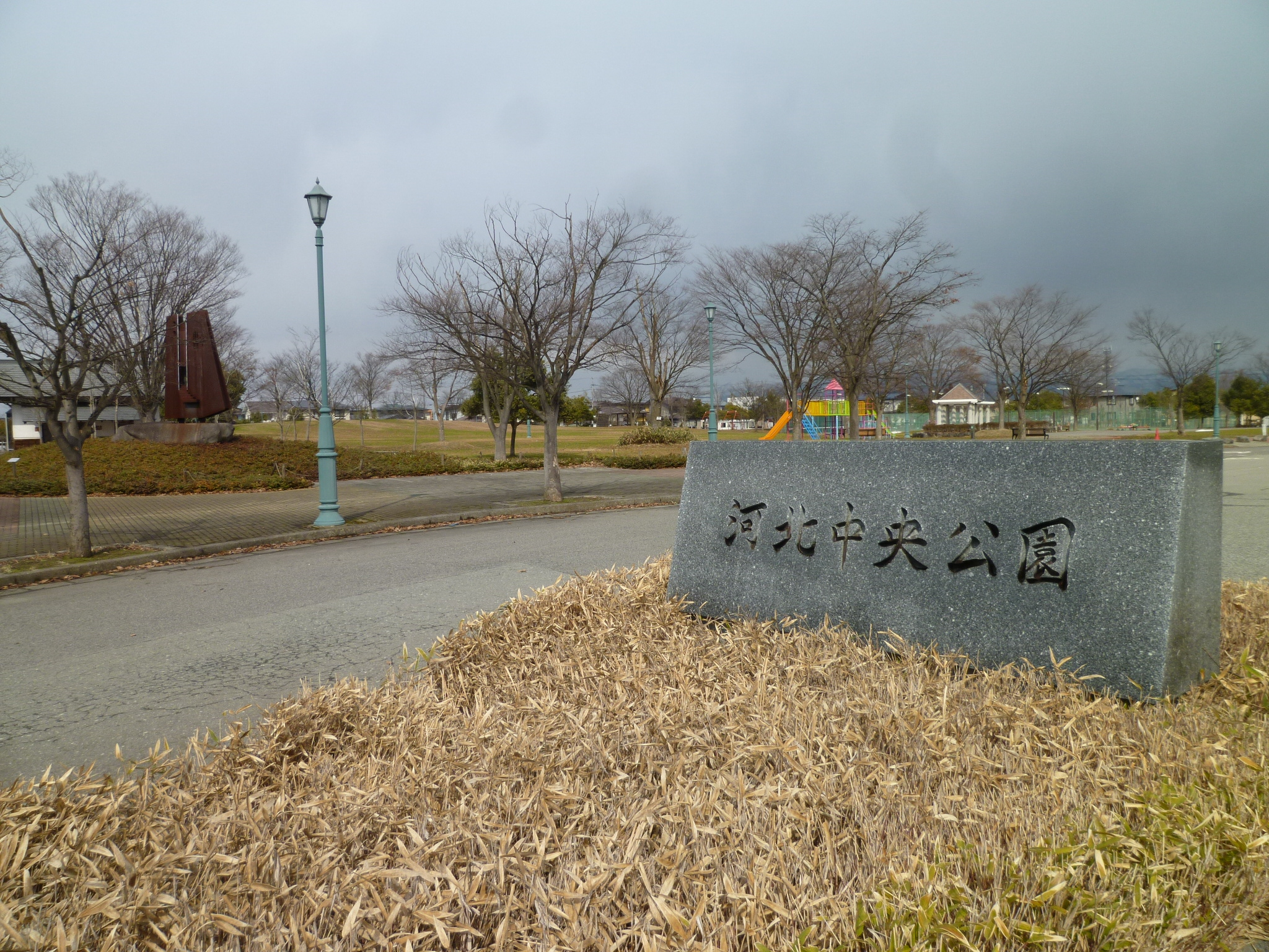 河北中央公園。山形県河北町谷地中央に所在。